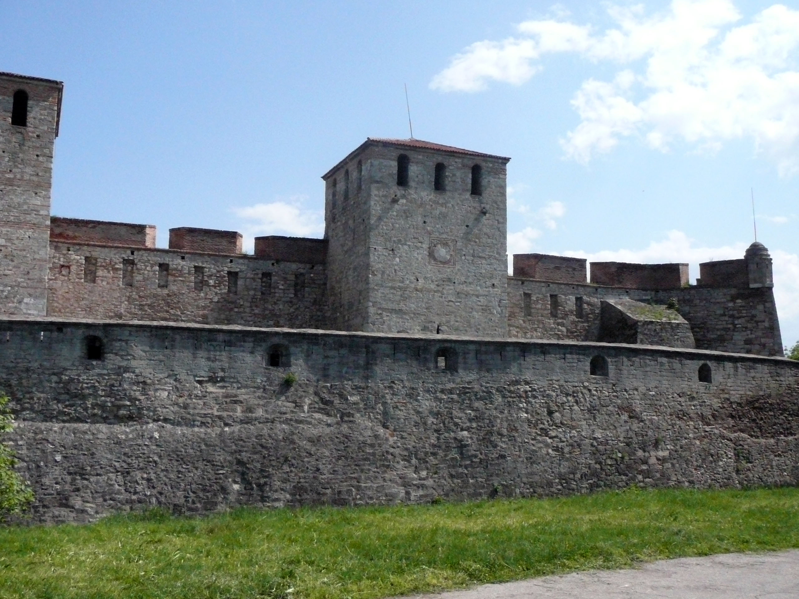 Baba Vida Fortress,Vidin,Bulgaria